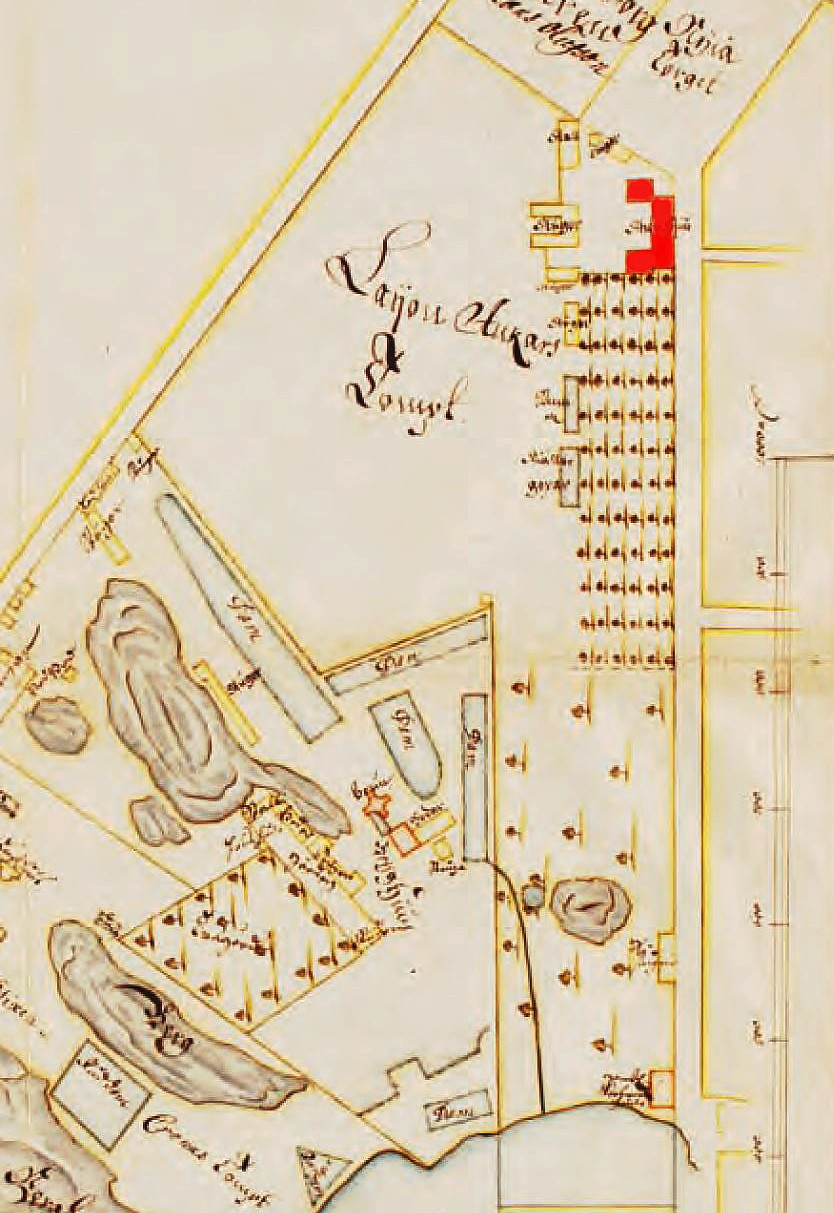 Leijonanckers tomt med markerade byggnader. Huset är rött på ritningen och benämns stenhus. Församlingskarta Katarina.